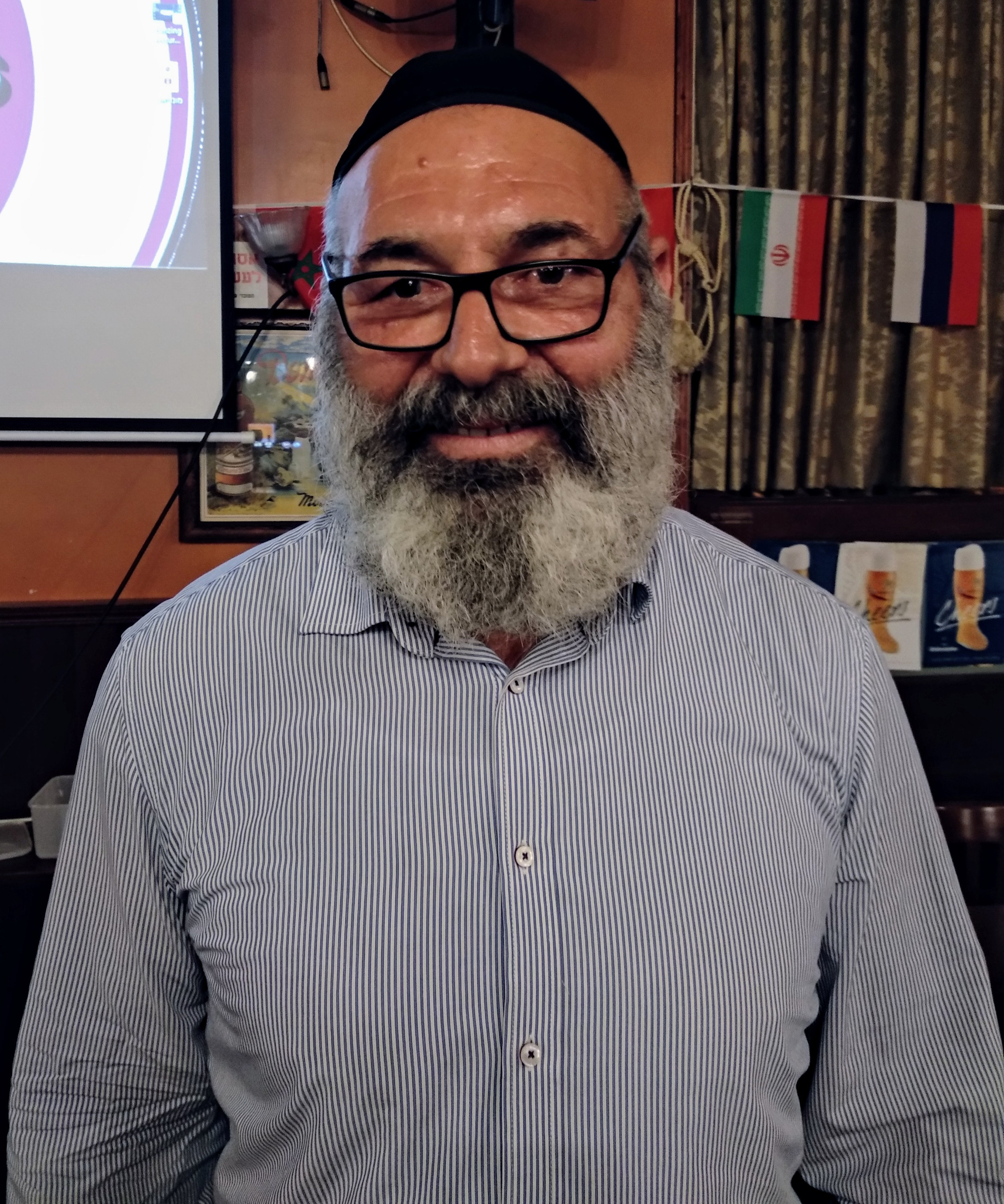 Avraham Sinai